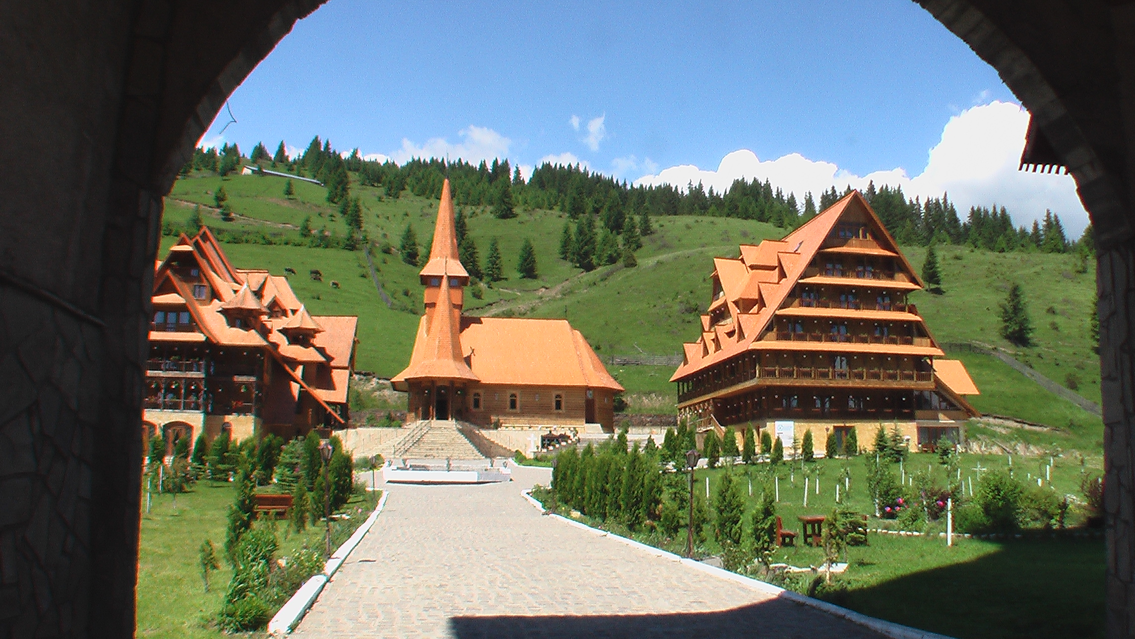 KlosterDomnului3